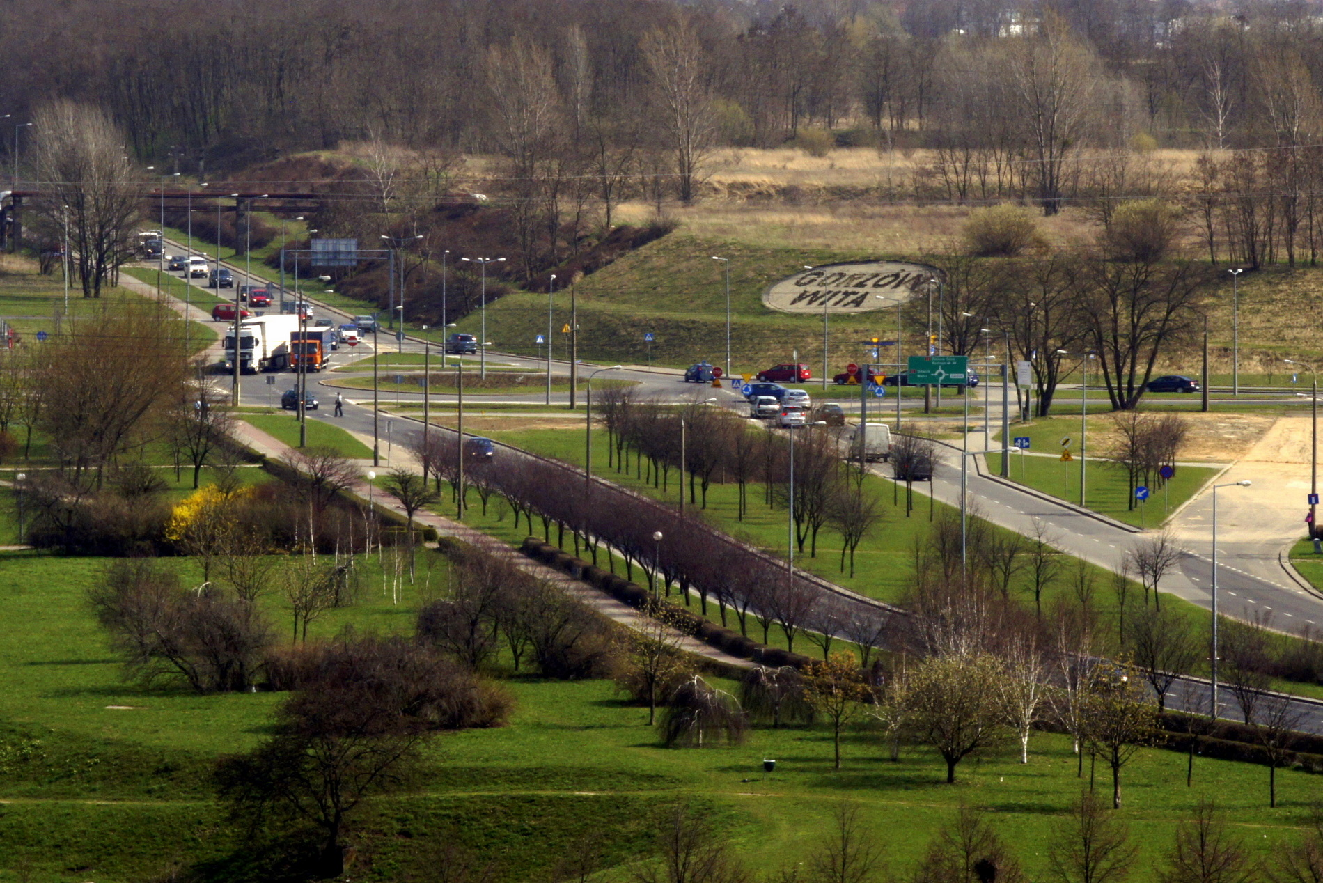 Rondo Gdańskie w Gorzowie Wlkp. Fragment drogi krajowej nr 22 - na wprost (ul. gen. Elżbiety Zawackiej)